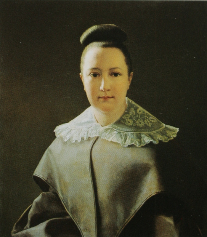 Дубельт Анна Николаевна (урождённая Перская)(1800 - 1853), супруга начальника Корпуса жандармов и управляющего III отделением Собственной Е. И. В.канцелярии Леонтия Васильевича Дубельта (1792-1862).